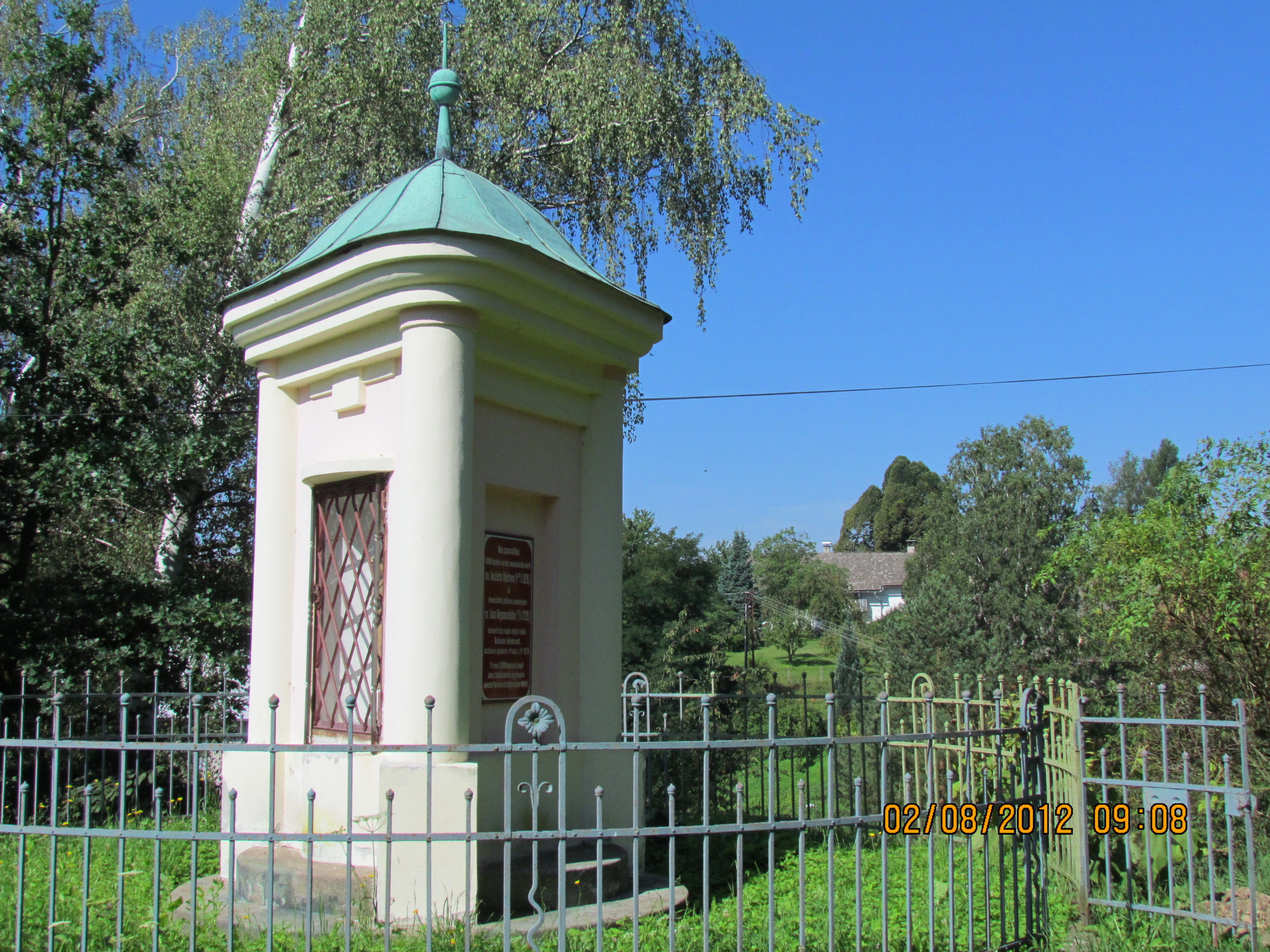 Soběslavice - pohled na kapli U Jáníčka, v pozadí chalupa U Tomsů se starou lípou